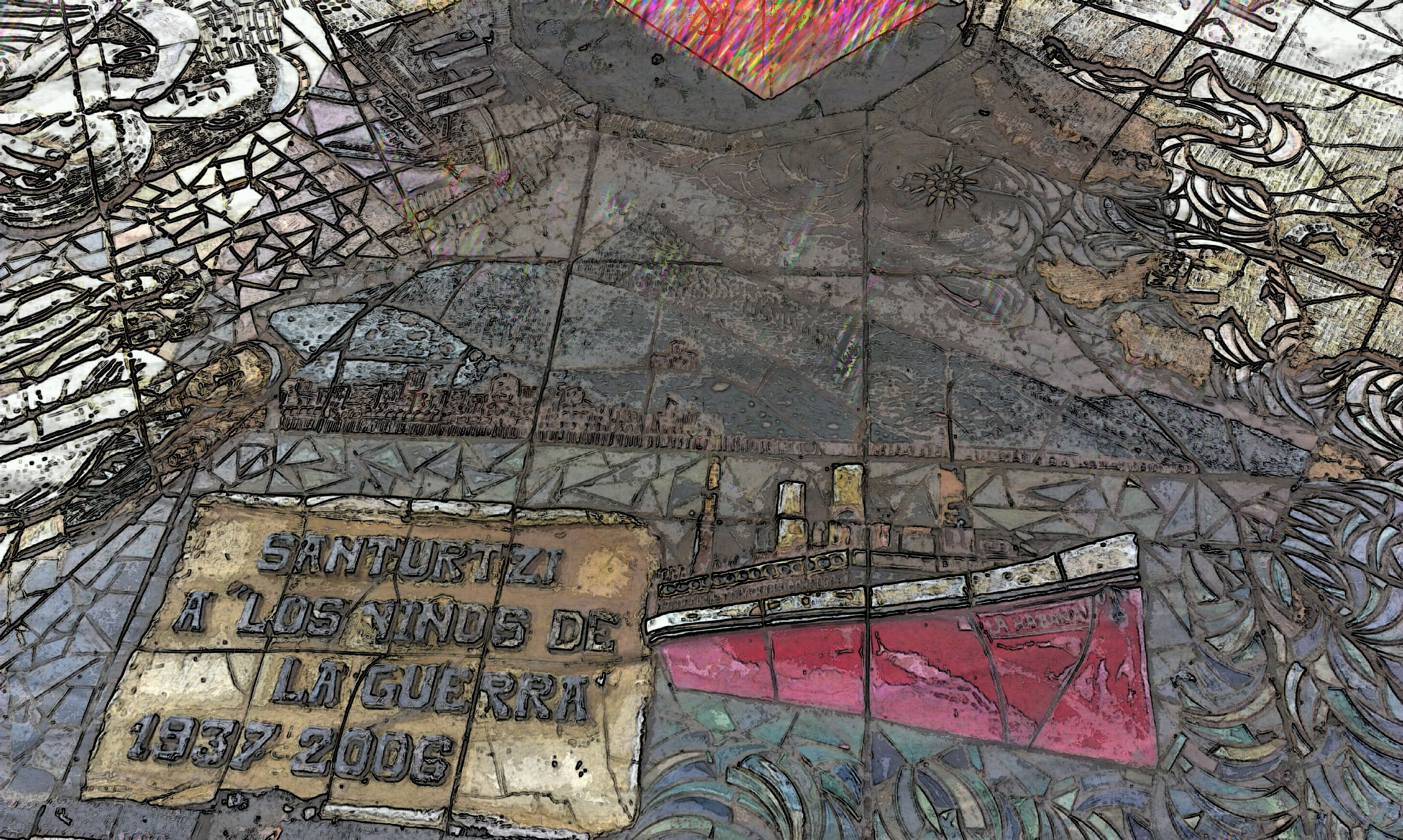 Santurtziko portuan dagoen artelana. Habana barkuan ehunka ume abiatu ziren atzerrira Gerra Zibilean.